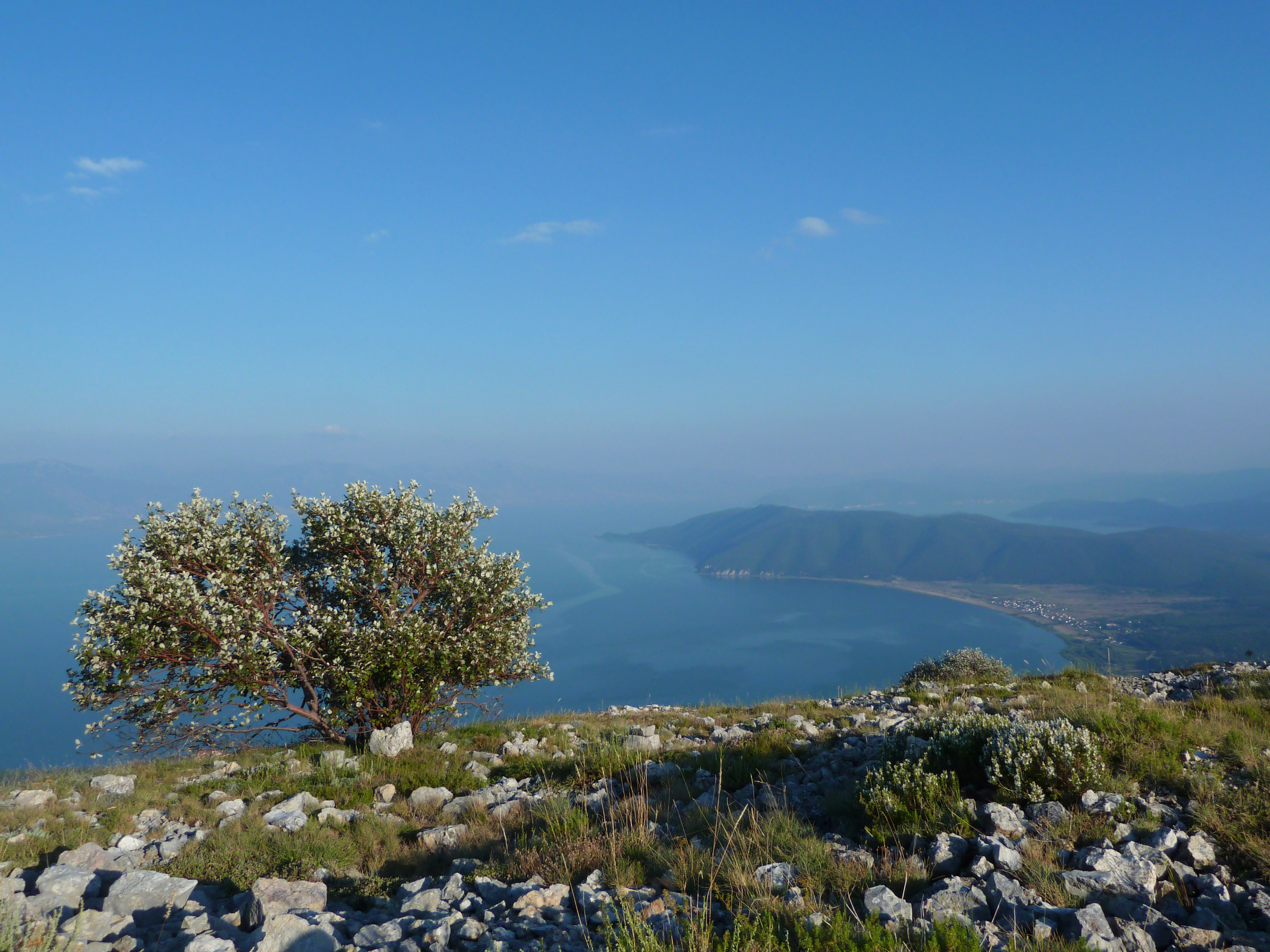 Село Стение на брега на Голямото Преспанско езеро.